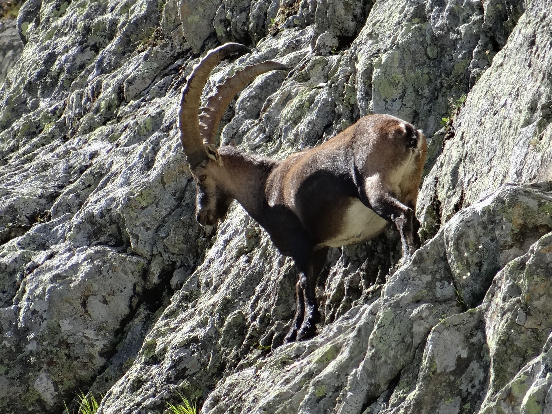 Bouquetin au col du Grand Marchet, Parc national de la Vanoise